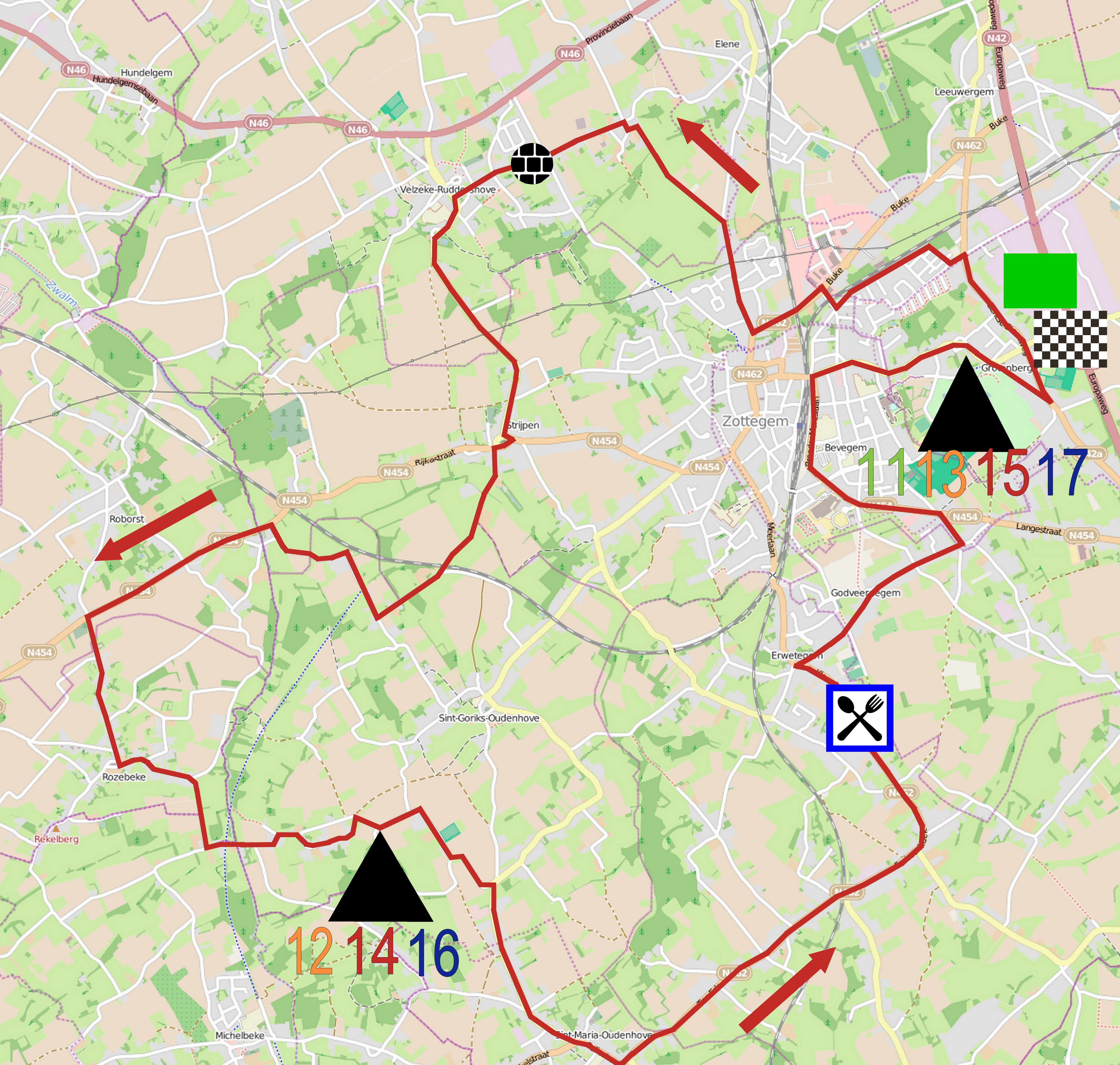 Reportage photographique réalisé le samedi 5 juillet à l'occasion du départ et de l'arrivée du Circuit Het Nieuwsblad espoirs 2014 à Grotenberge (Zottegem), Belgique.